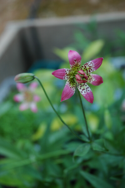 Lilium parvum var. hallidayi